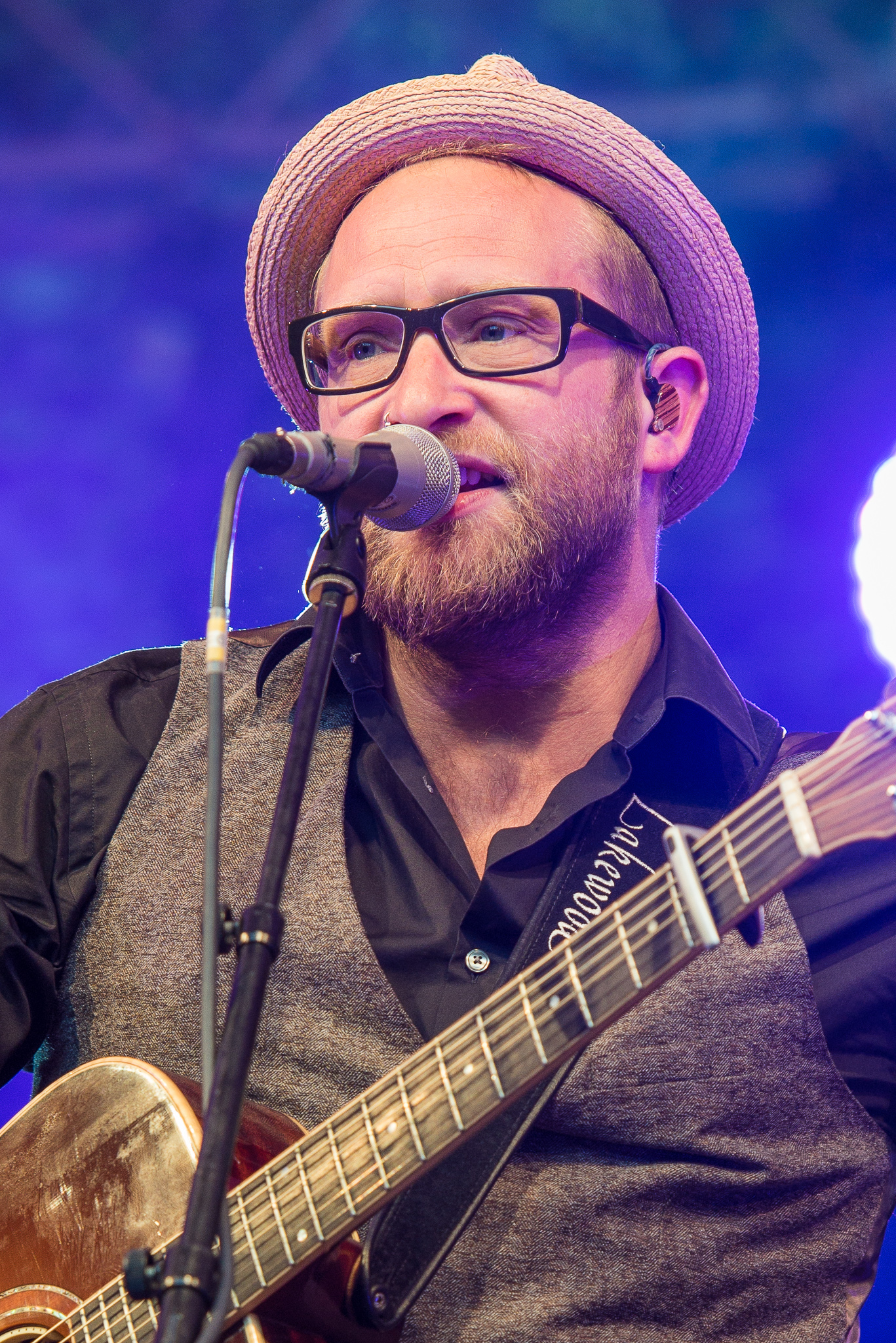 Concertbüro Franken,Gregor Fabian Meyle,Gregor Meyle,Konzert,Livekonzert,Livemusik,Musik,Serenadenhof